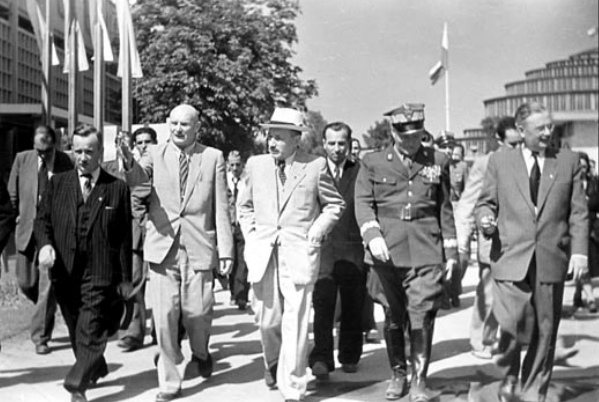 Otwarcie wystawy Ziem Odzyskanych, od lewej Stanisław Szwalbe, Bolesław Bierut, Konstanty Rokosowski i Hilary Minc